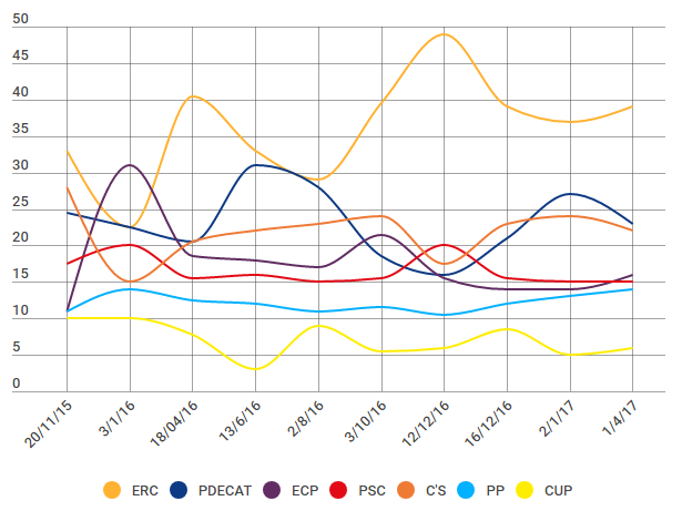 enquesteseleccionsparlamentcatalunya20152017